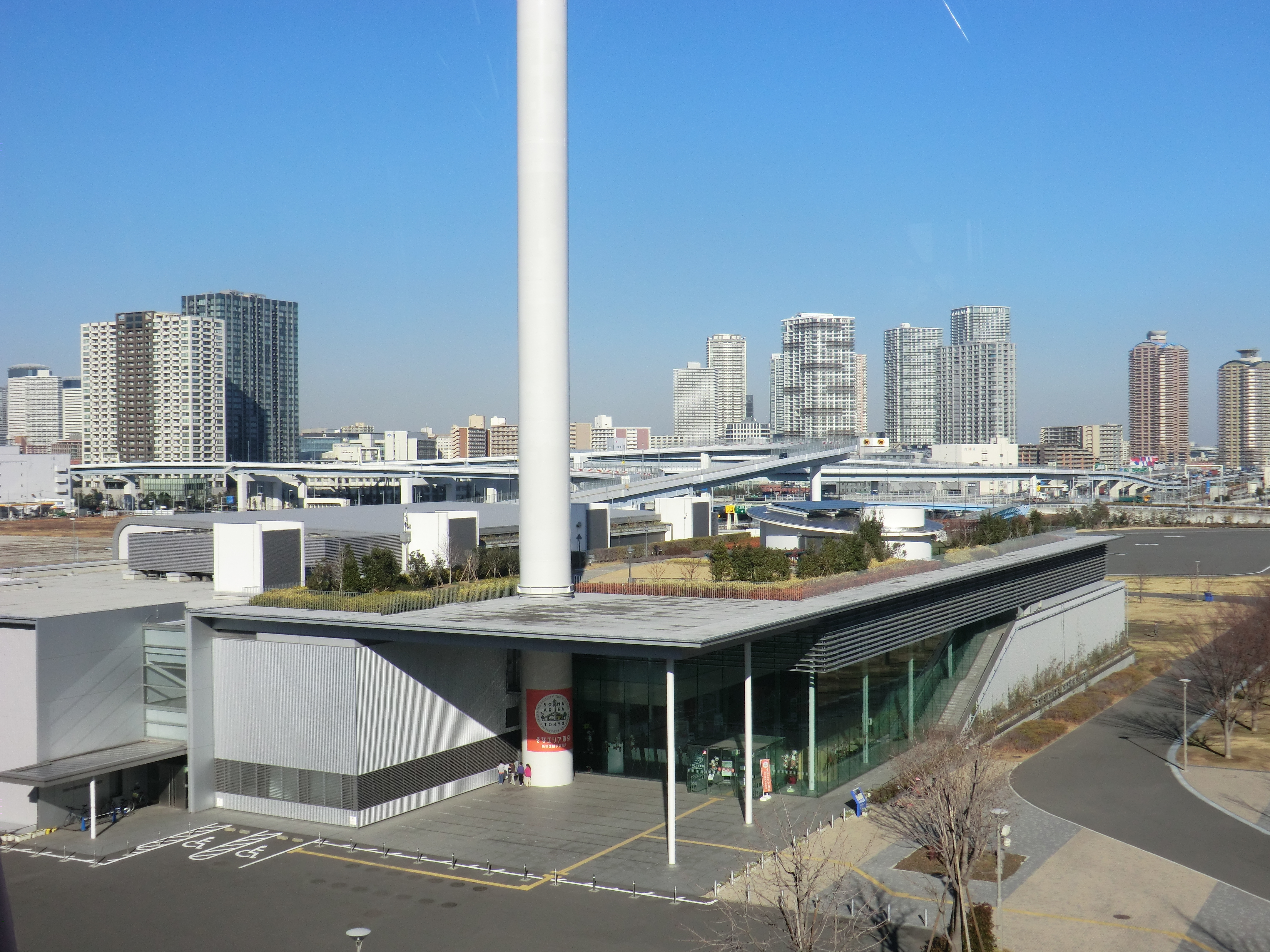 ゆりかもめ（東京臨海新交通線）有明駅付近から東雲ジャンクションを望む